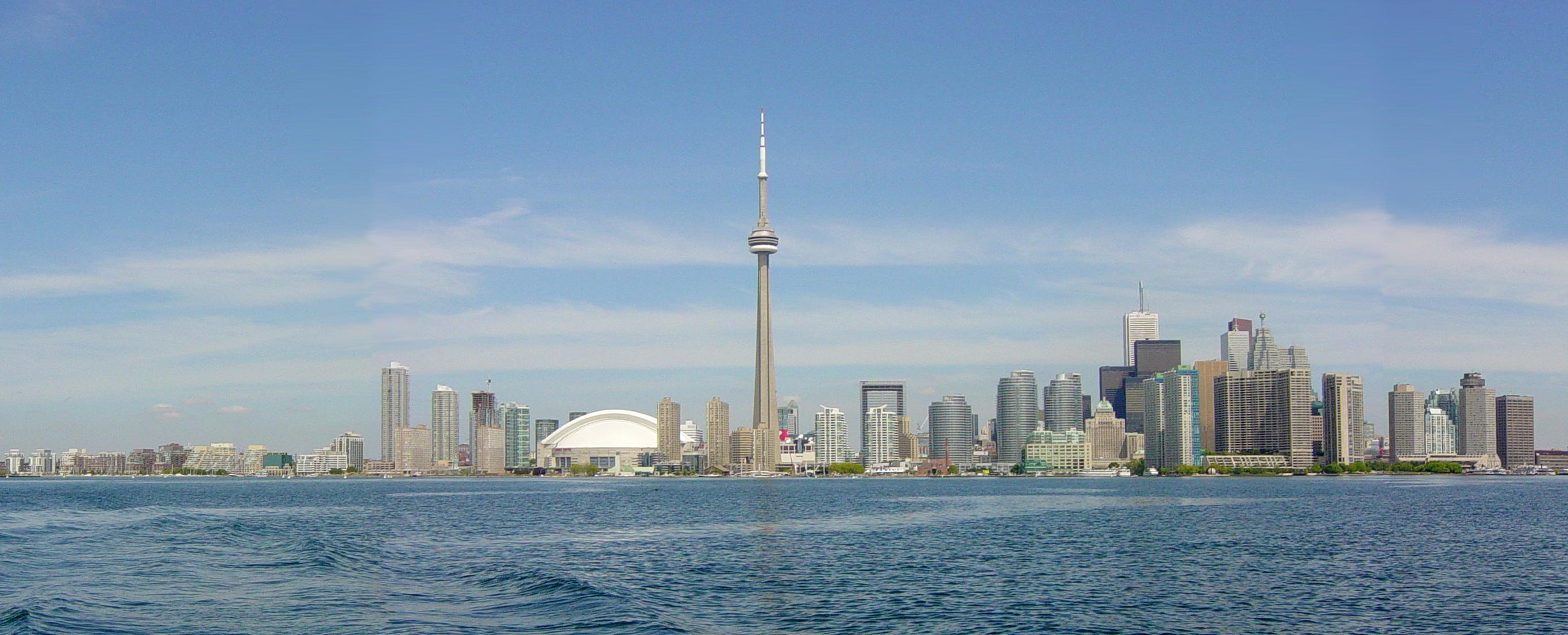 Toronto skyline